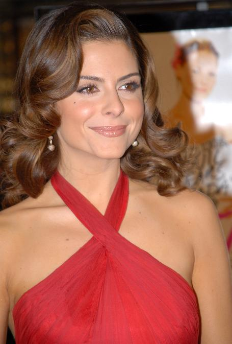 Maria Menounos